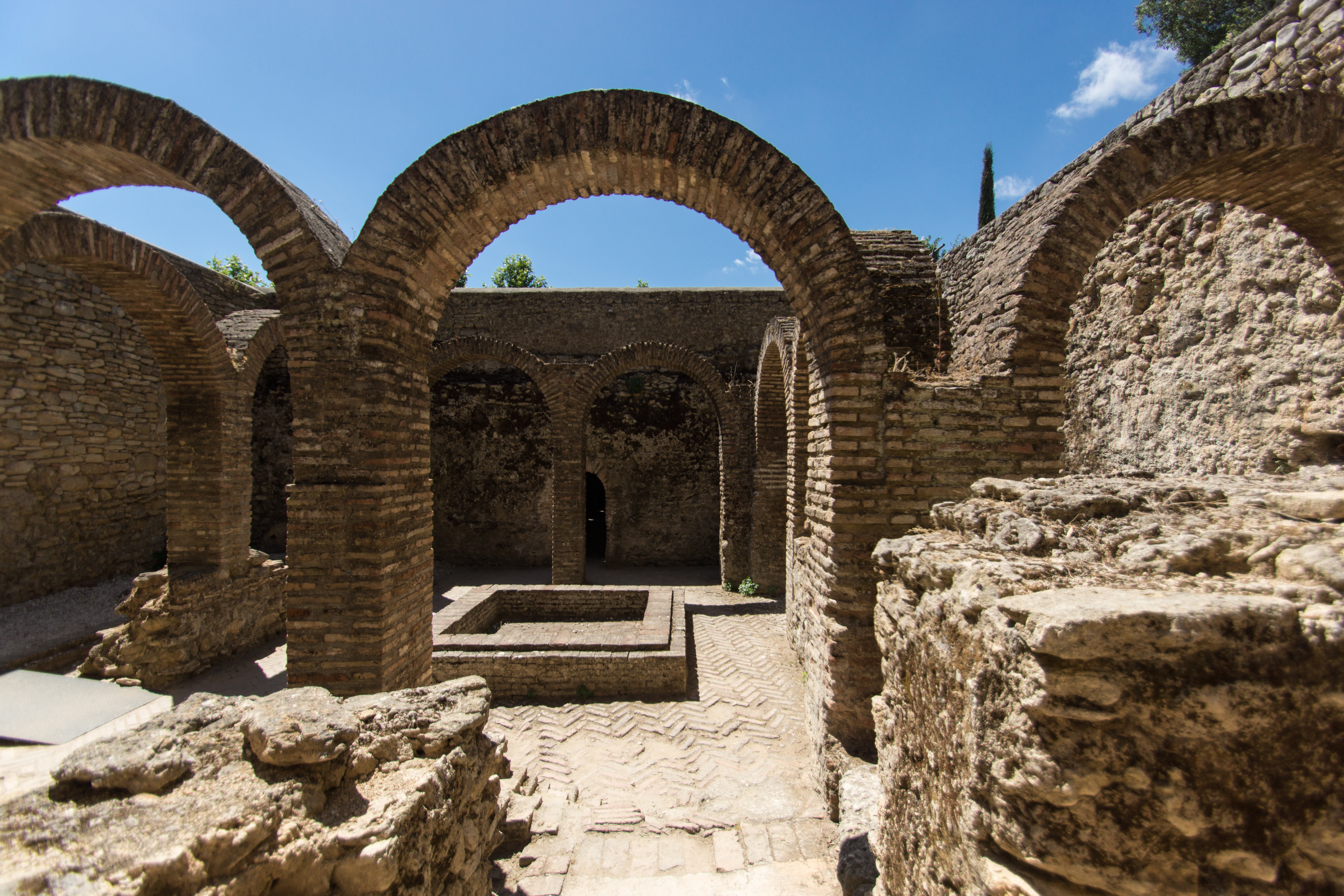 Baños Árabes parte exterior